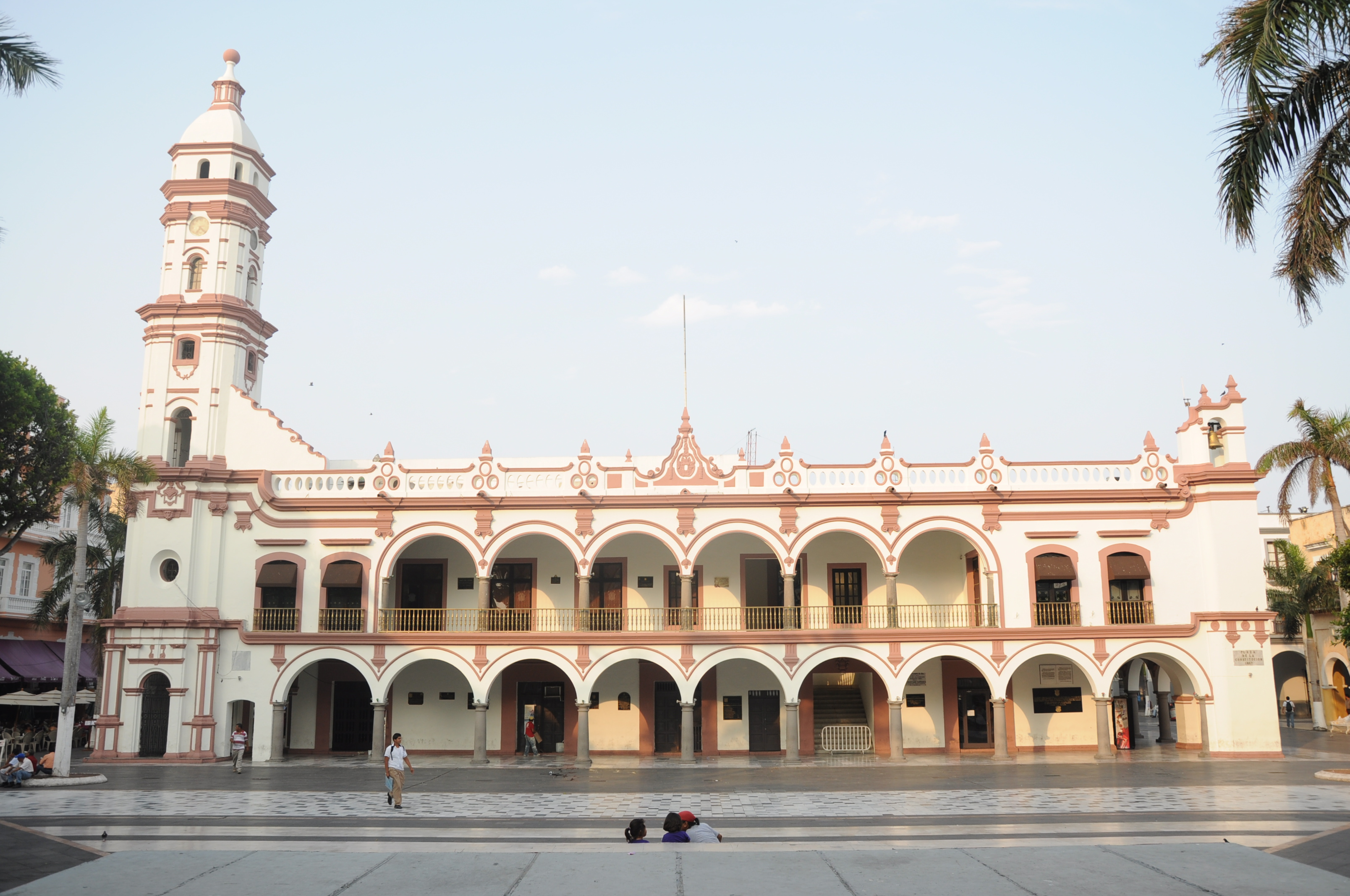 Imagen actual del Palacio Municipal de Veracruz en el 2011